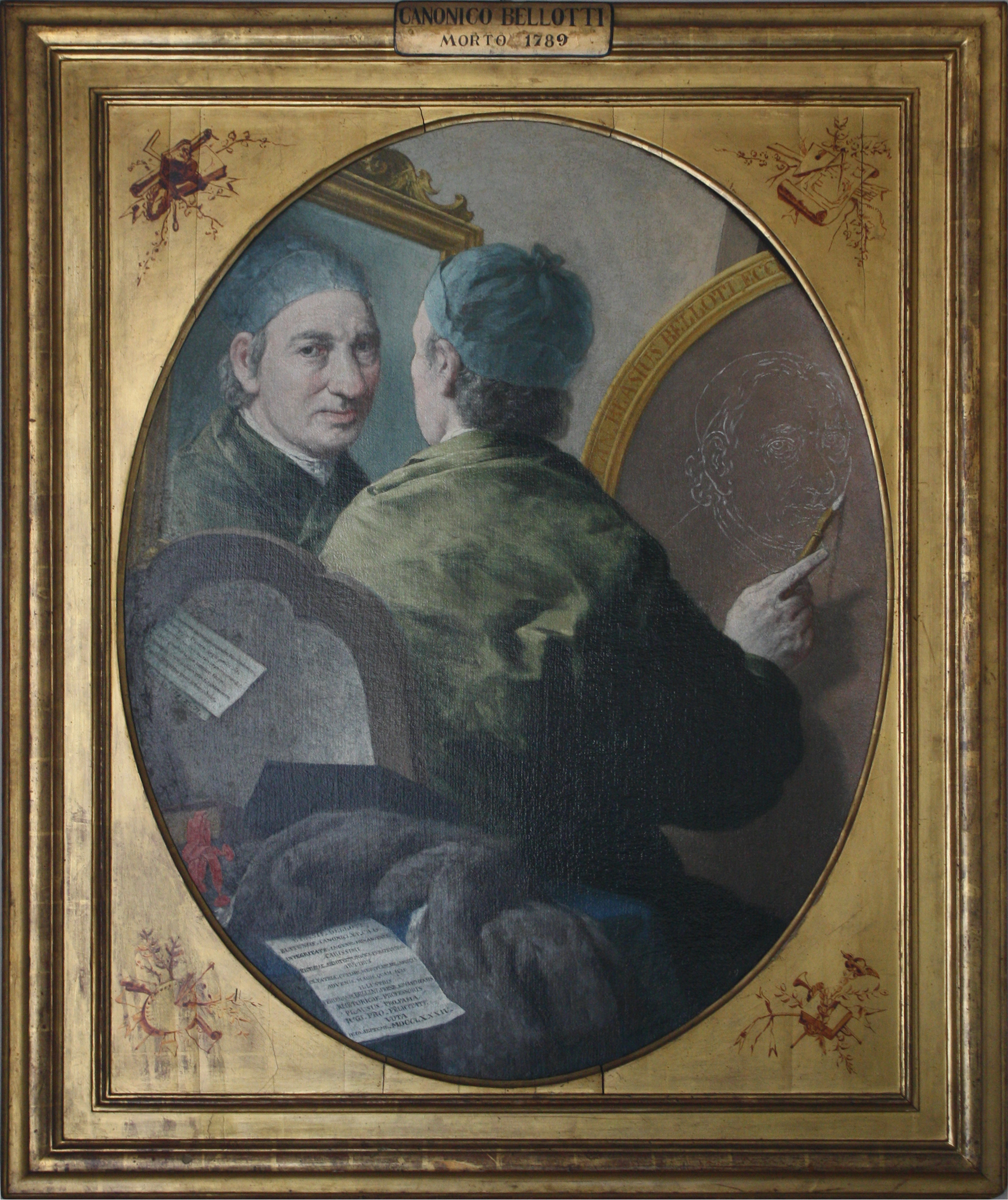 Autoritratto del pittore Biagio Bellotti, raffigurato mentre realizza un autoritratto guardandosi allo specchio.